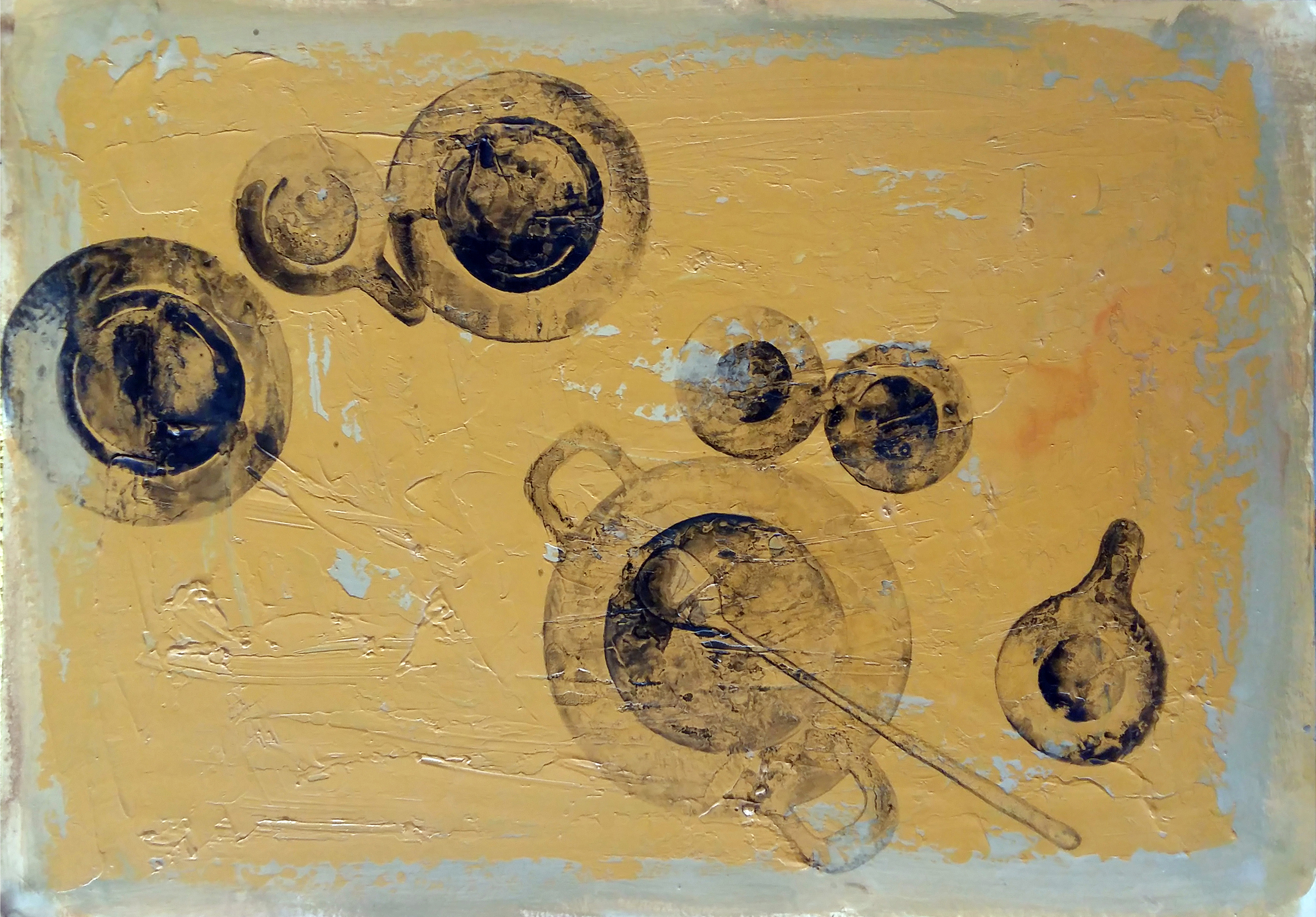 Без назива, Комбинована техника 2018. 70 х 50 цм, уметничко дело аутора Данице Веселиновић Лиценцирање Template:Za ostavu